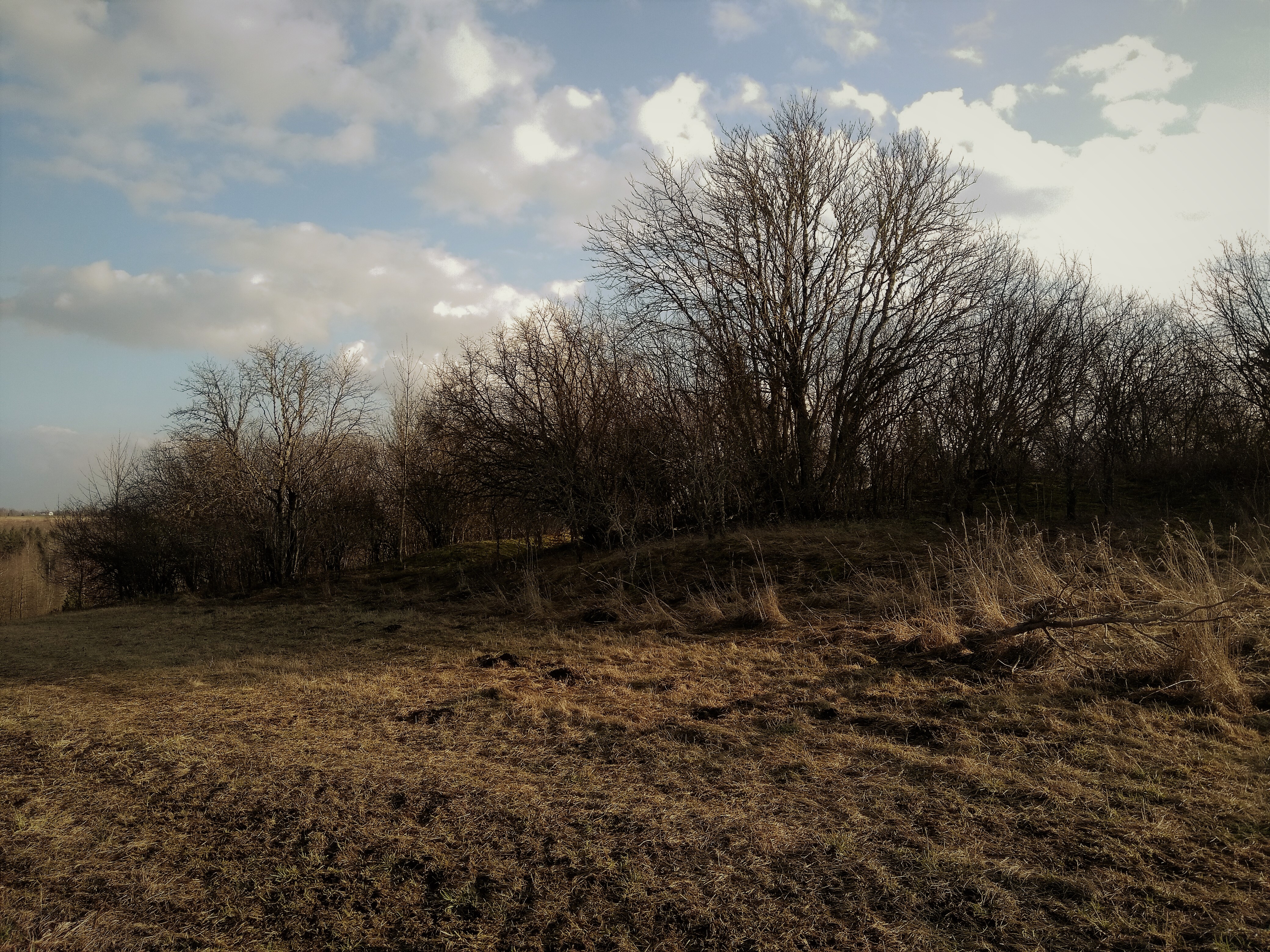 Vaade põhjast linnuse maa-ala põhja-loodenurgale.